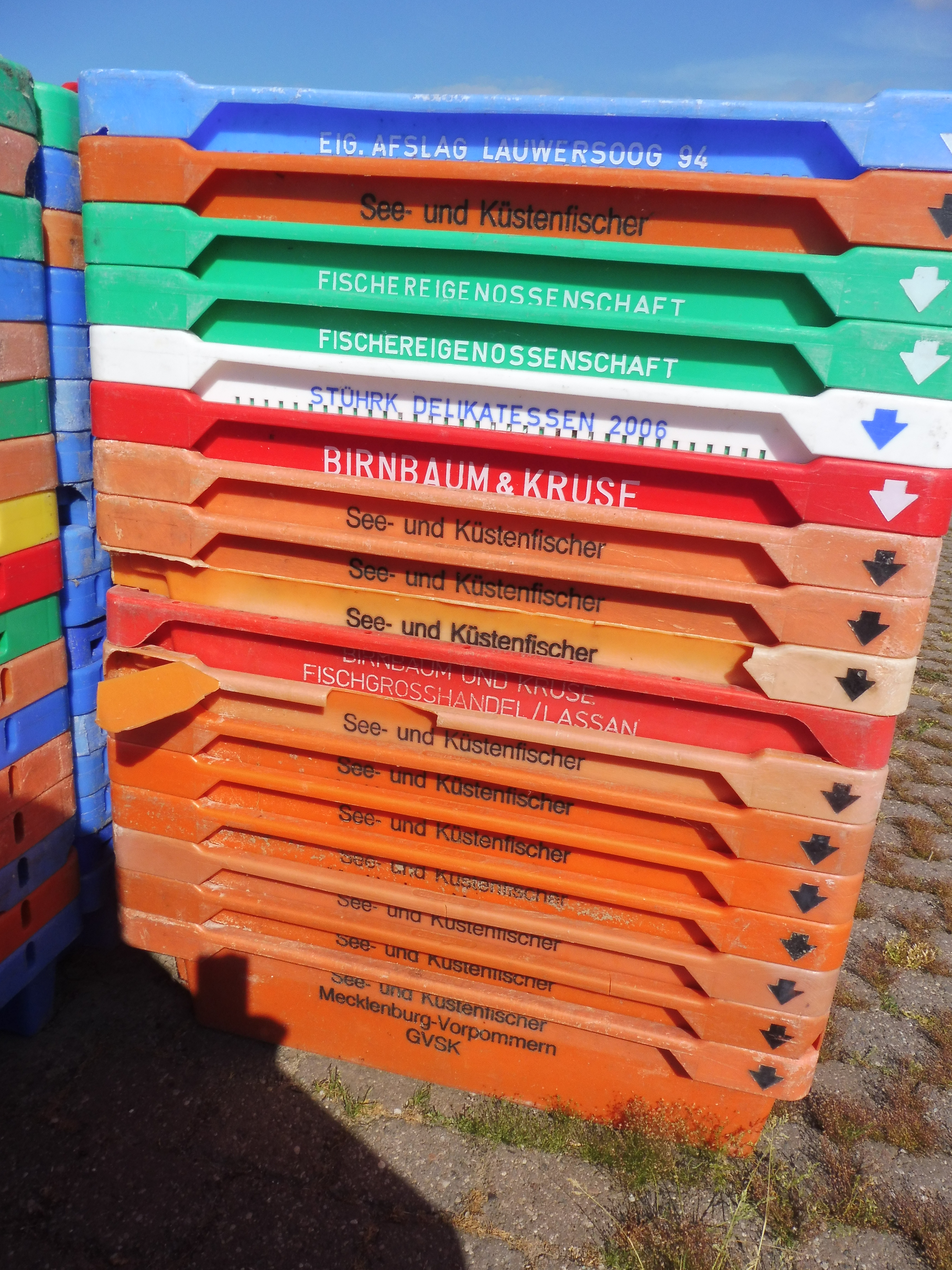 Transportkisten von Fischhändlern